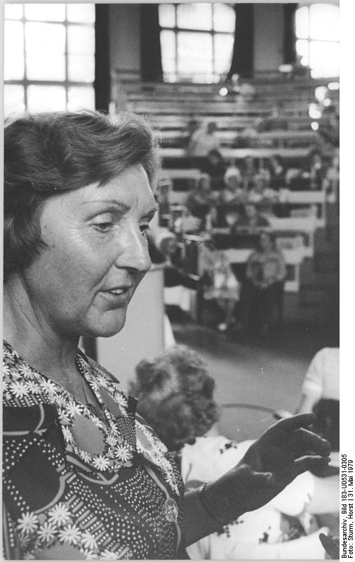 Berlin, Seniorenstudentin Zum Beitrag: Mit 57 die jüngste Studentin-Neue Veteranen freuen sich schon auf den Hörsaal ADN-ZB Sturm-31.5.1979 Erika Grimmig, Vorsitzende der Ortsgruppe der Volkssolidarität in Eichwalde bei Berlin, ist mit ihren 57 Jahren die jüngste unter den Hörern des ersten Studienjahres der neu geschaffenen Veteranen-Universität an der Berliner Humboldt-Universität. (Bitte beachten Sie hierzu auch U0531-304N, 306N und 307N!)